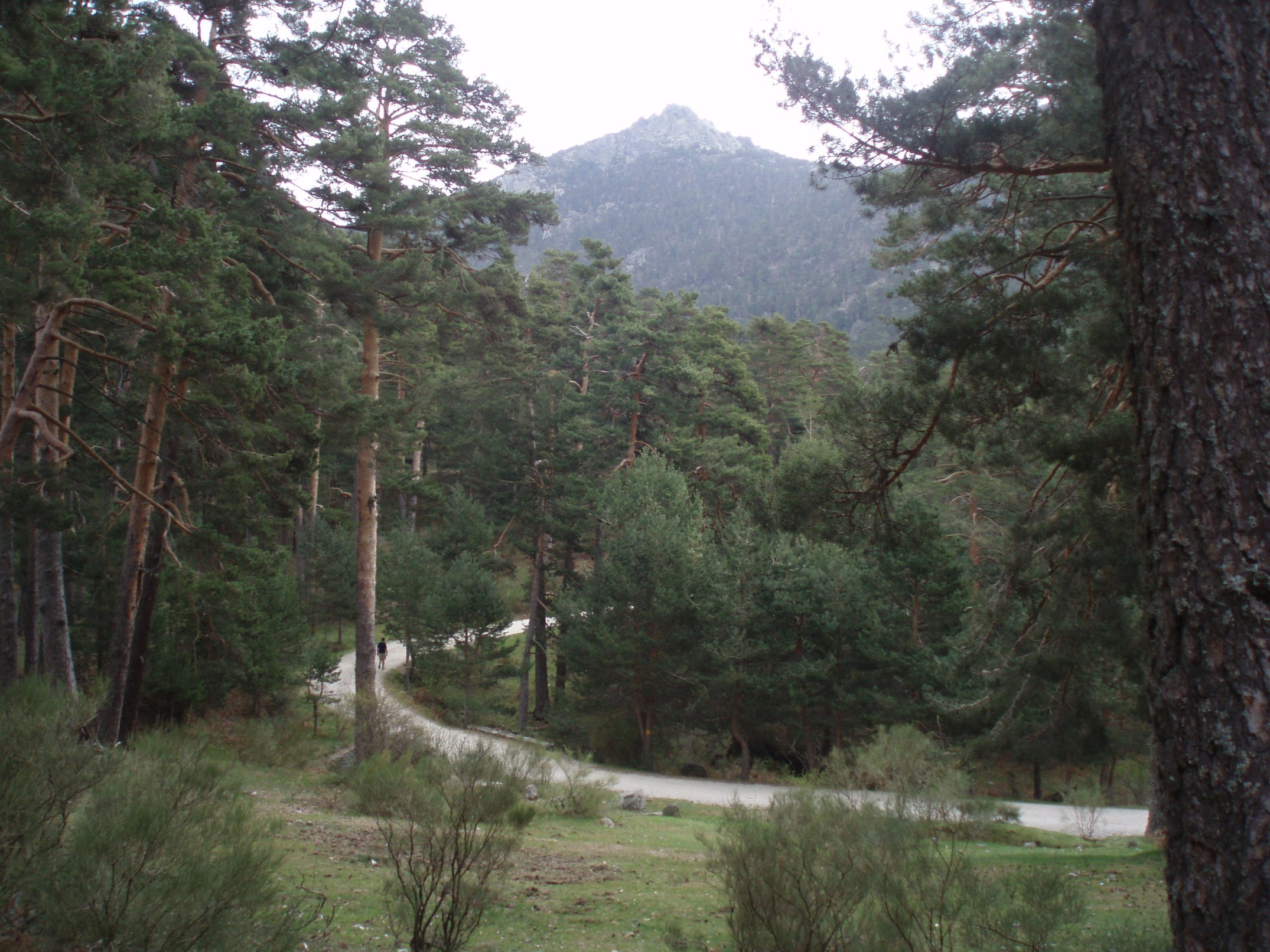 Carretera de la República en el valle de la Fuenfría con el pico Majalasna al fondo (Sierra de Guadarrama, España).